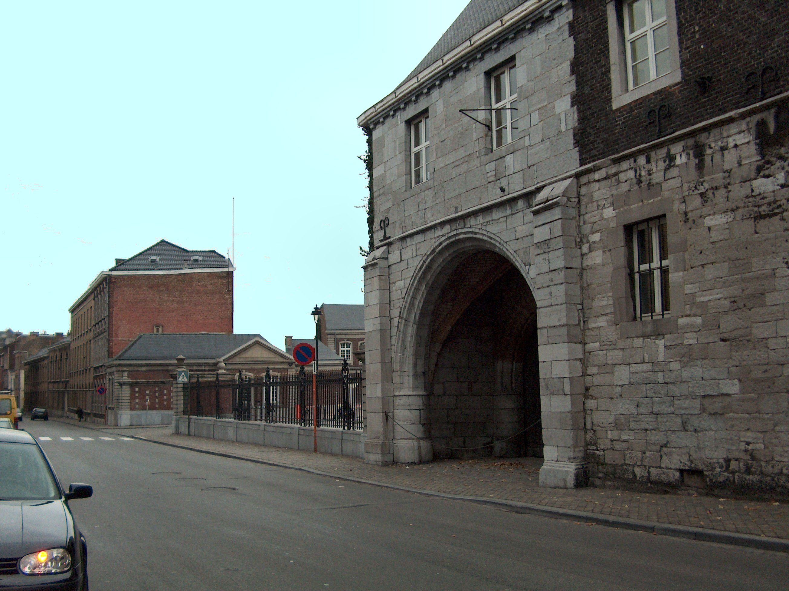 Photo personnelle (Claude Warzée 2003) de l'ancien portail de l'abbaye de Saint-Laurent (XVème siècle).